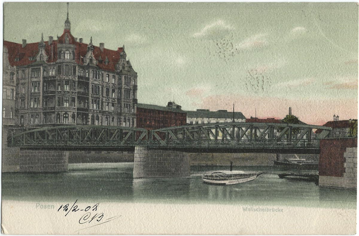 Vue de Posen au début du XXe siècle (aujourd'hui Poznań, en Pologne).